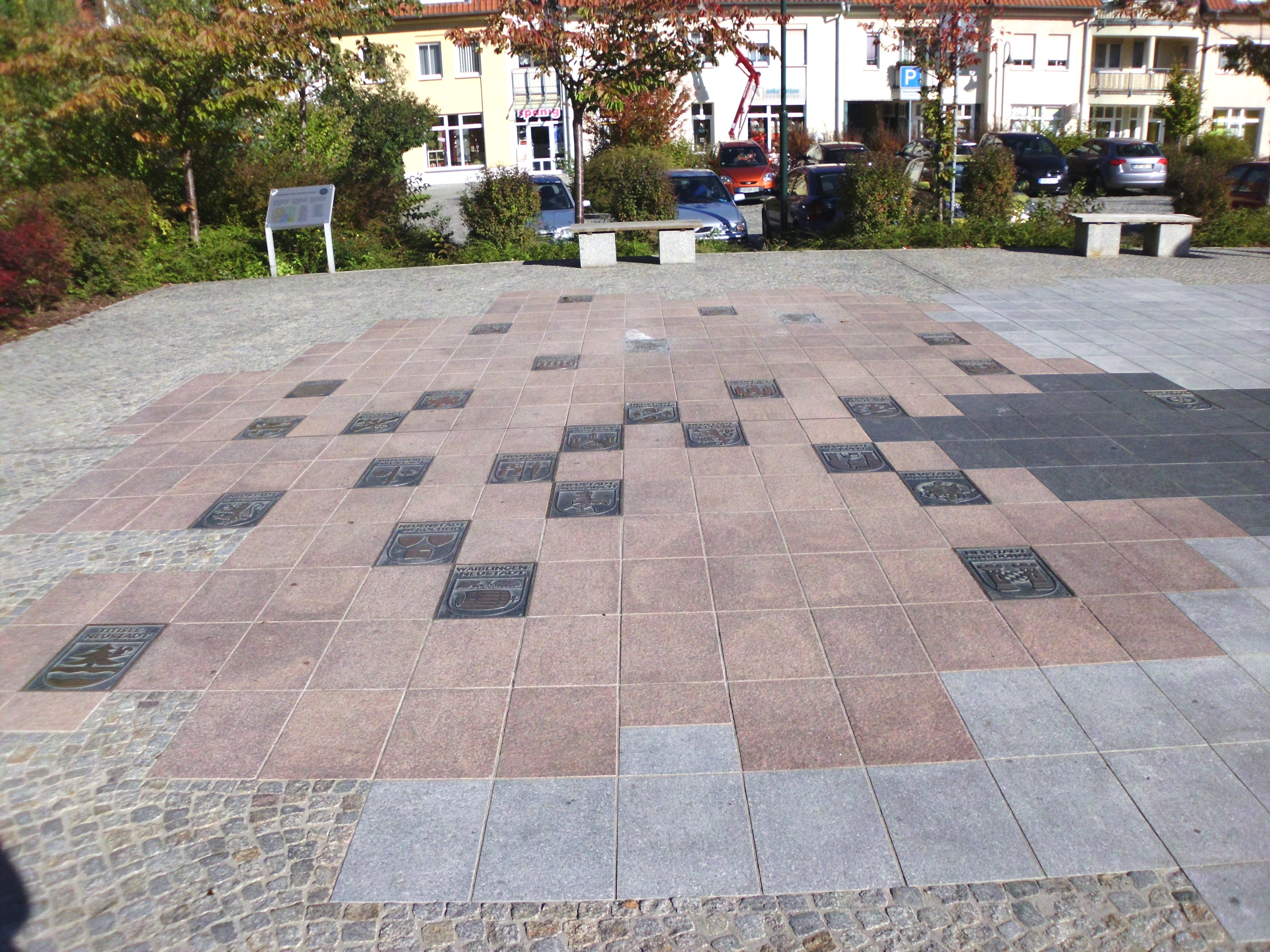 In Neustadt in Sachsen in den Boden eingelassene Tafeln mit Namen und Wappen der Städte mit dem Namen Neustadt (in der jeweiligen Sprache), die zur Arbeitsgemeinschaft der Neustadts in Europa gehören (Stand 2005) Hornjoserbsce: W Neustadće w Sakskej do pódy zasadźene tafle z mjenom a woponom městow z mjenom Neustadt (we wotpowědnej rěči), kotrež słušeja k dźěłowemu zhromadźenstwu Neustadtow w Europje (staw 2005)